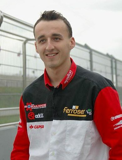 Robert Kubica, coureur